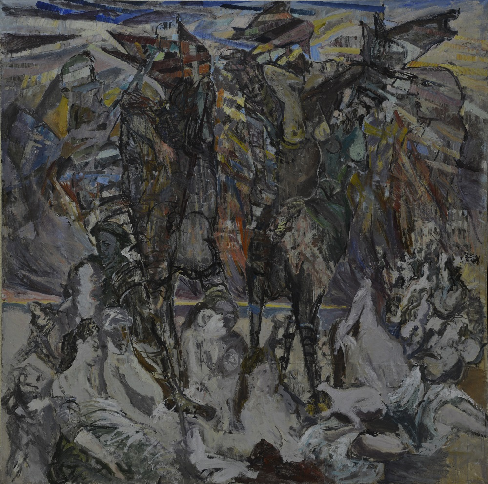 «Истерзанная Россия» из серии «Апокалипсис». Холст, масло